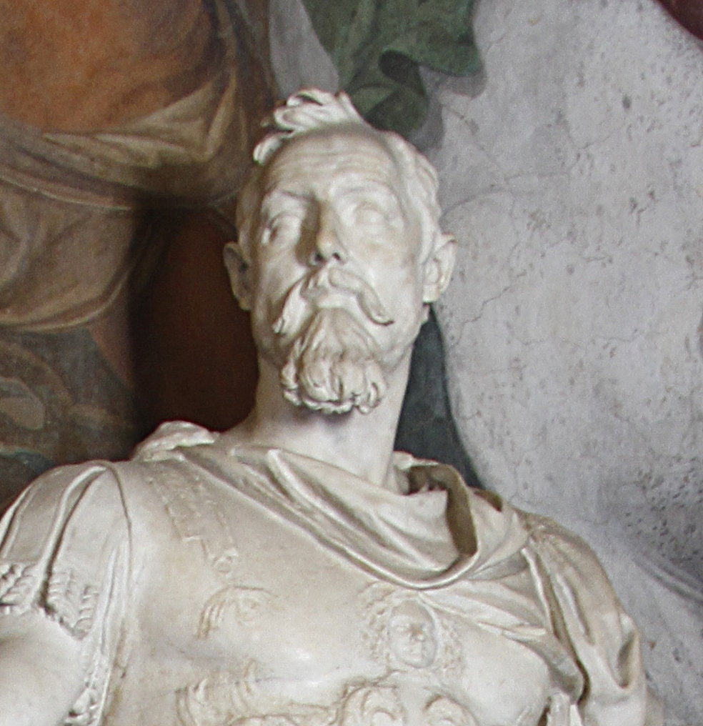 Palazzo dei Conservatori - Musei Capitolini - Rome